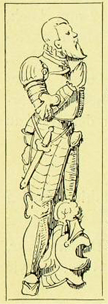 Andreas Pflugk. Zeichnung der Reliefdarstellung des Andreas Pflugk am ehemaligen Pflugk-Denkmal in der Kirche von Knauthain durch Cornelius Gurlitt 1894